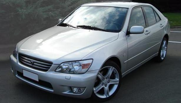 Toyota Altezza AS200 Z Edition